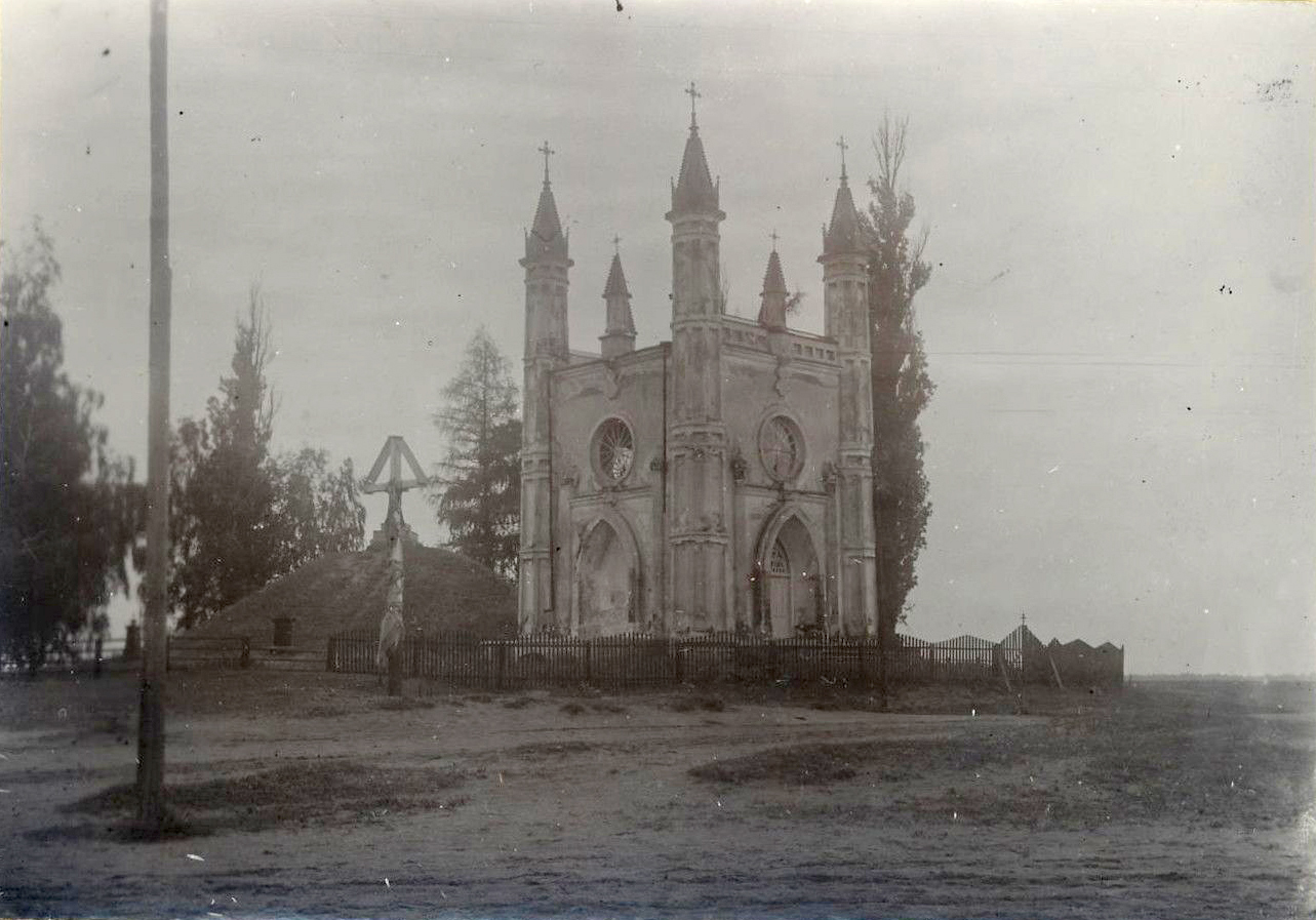 Беларуская (тарашкевіца): Хвойнікі (Chvojniki), капліца-пахавальня роду Прозараў (Prozar)